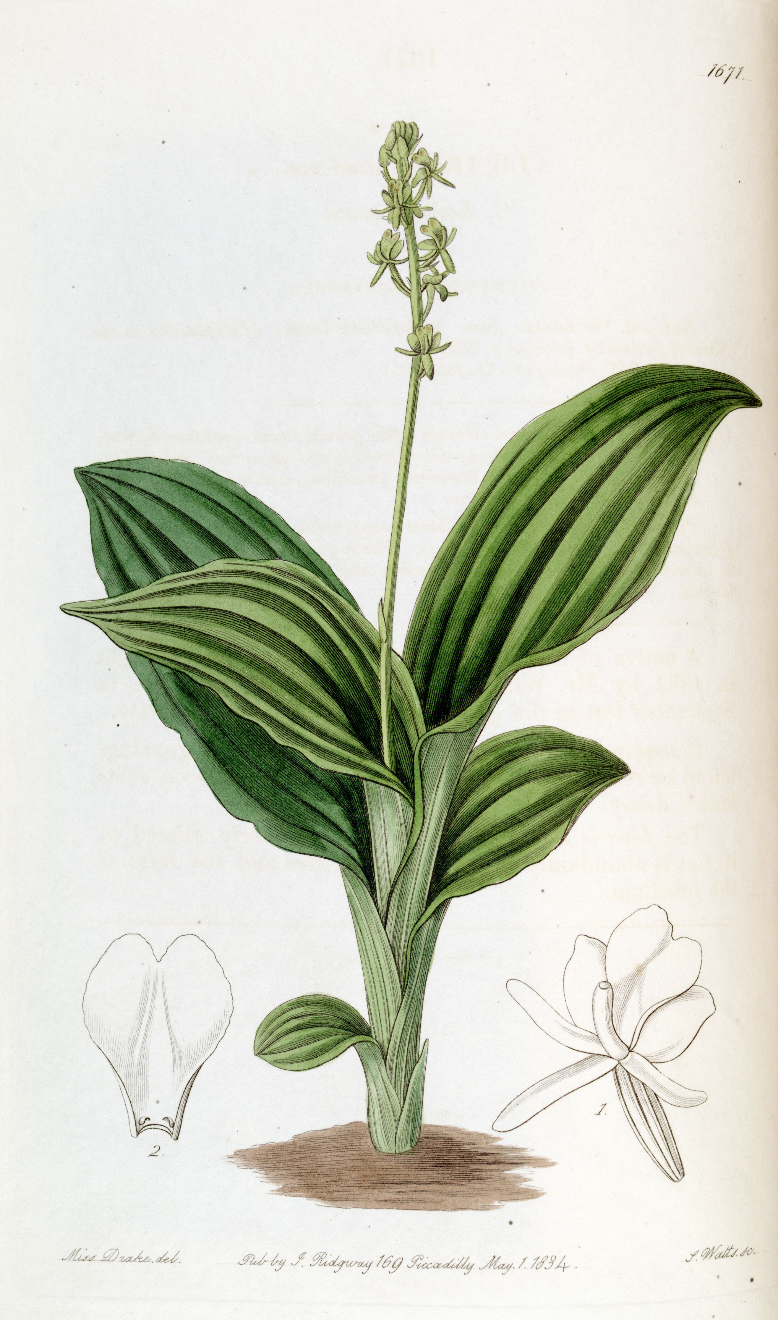 Liparis nervosa ssp. nervosa (as syn. Liparis guineensis)